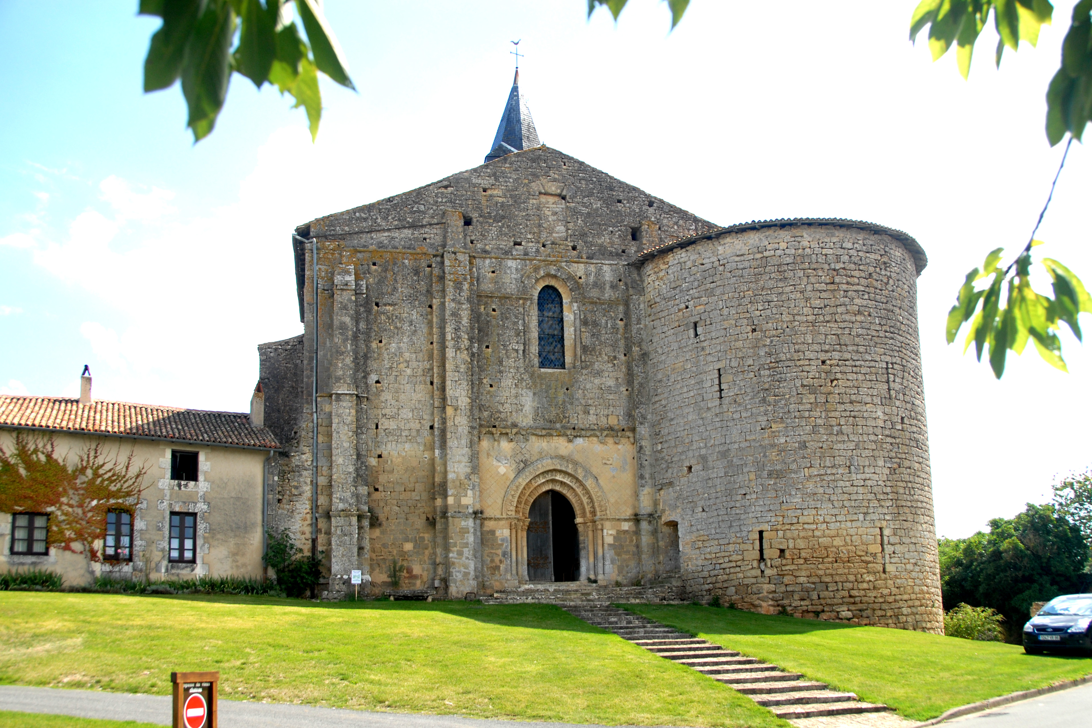 Câteau-Larcher, Kirche mit Wehrturm